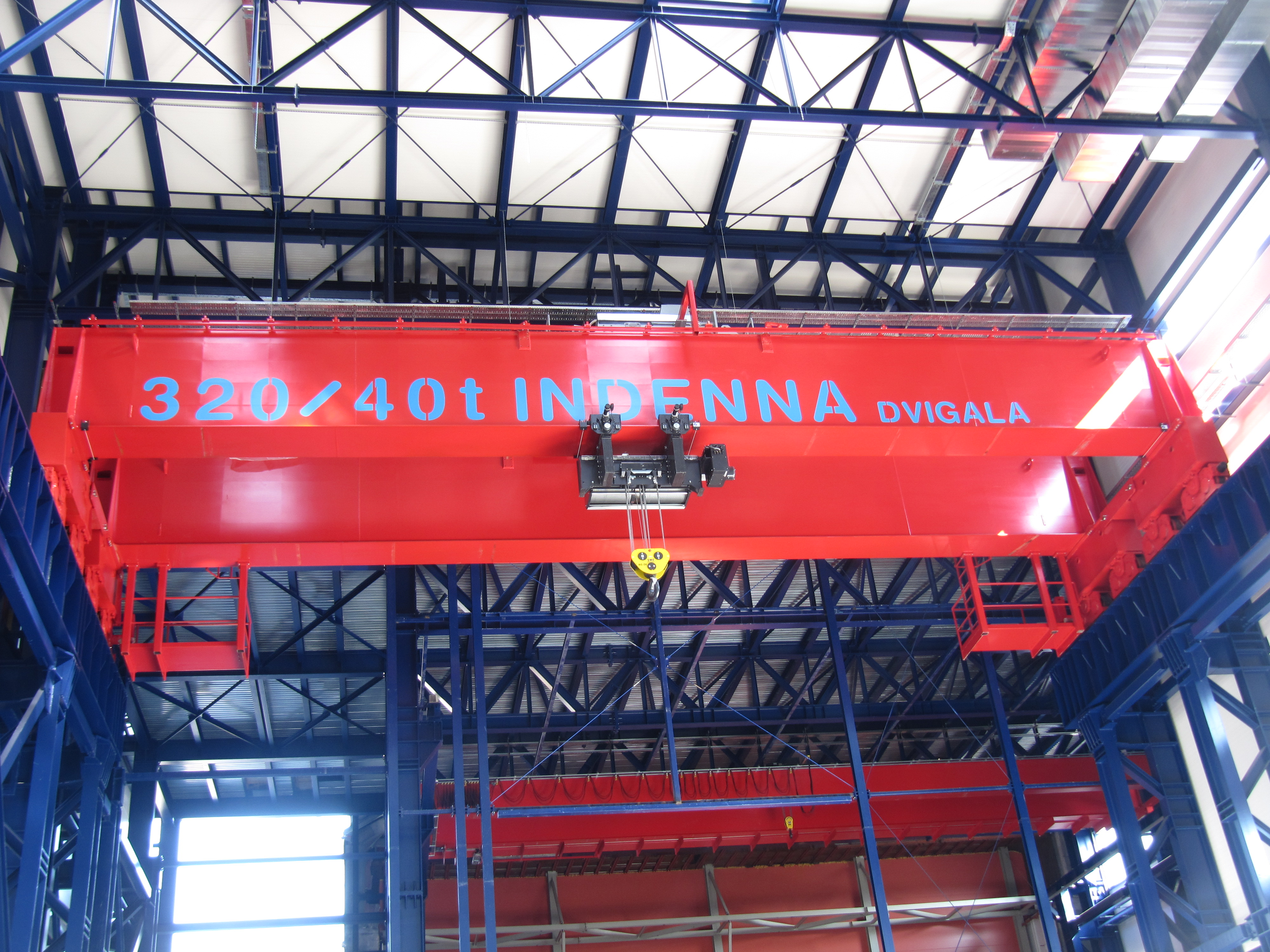 Dvonosilčno mostno dvigalo nosilnosti 320/40 ton.